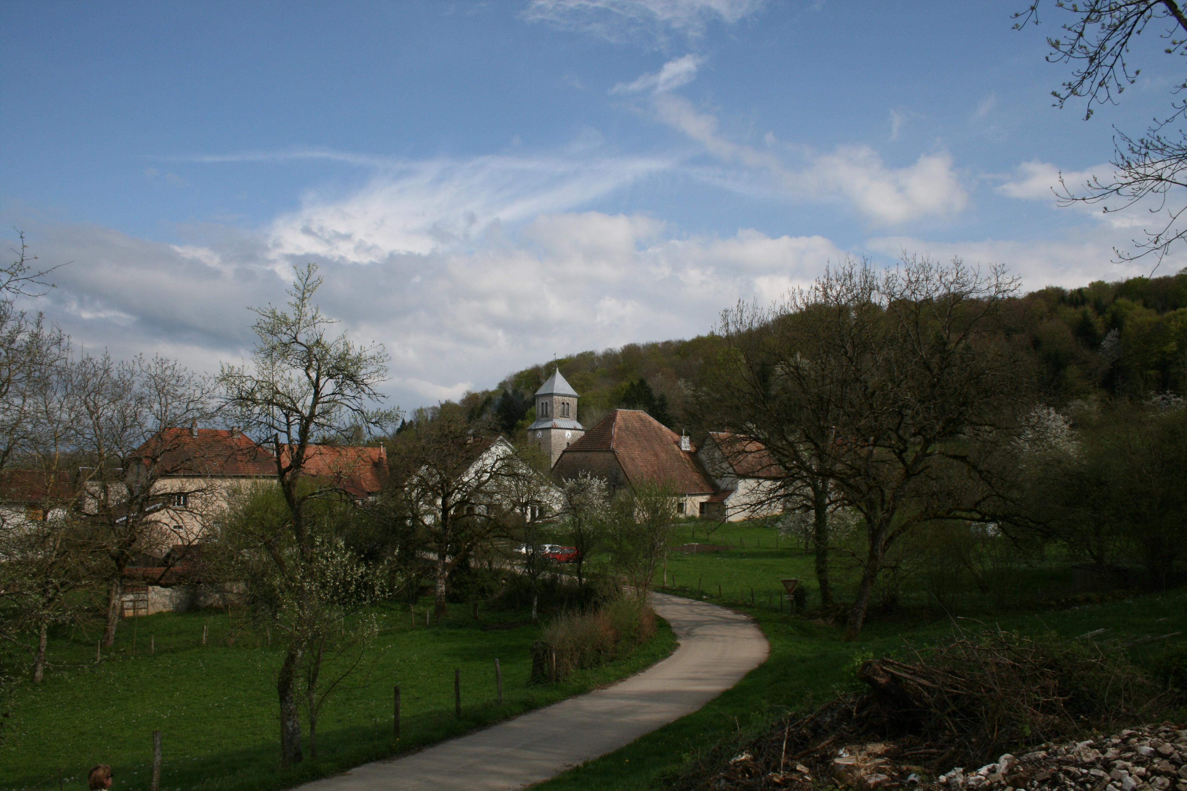 Alaise (Doubs) vue de l'église et du village